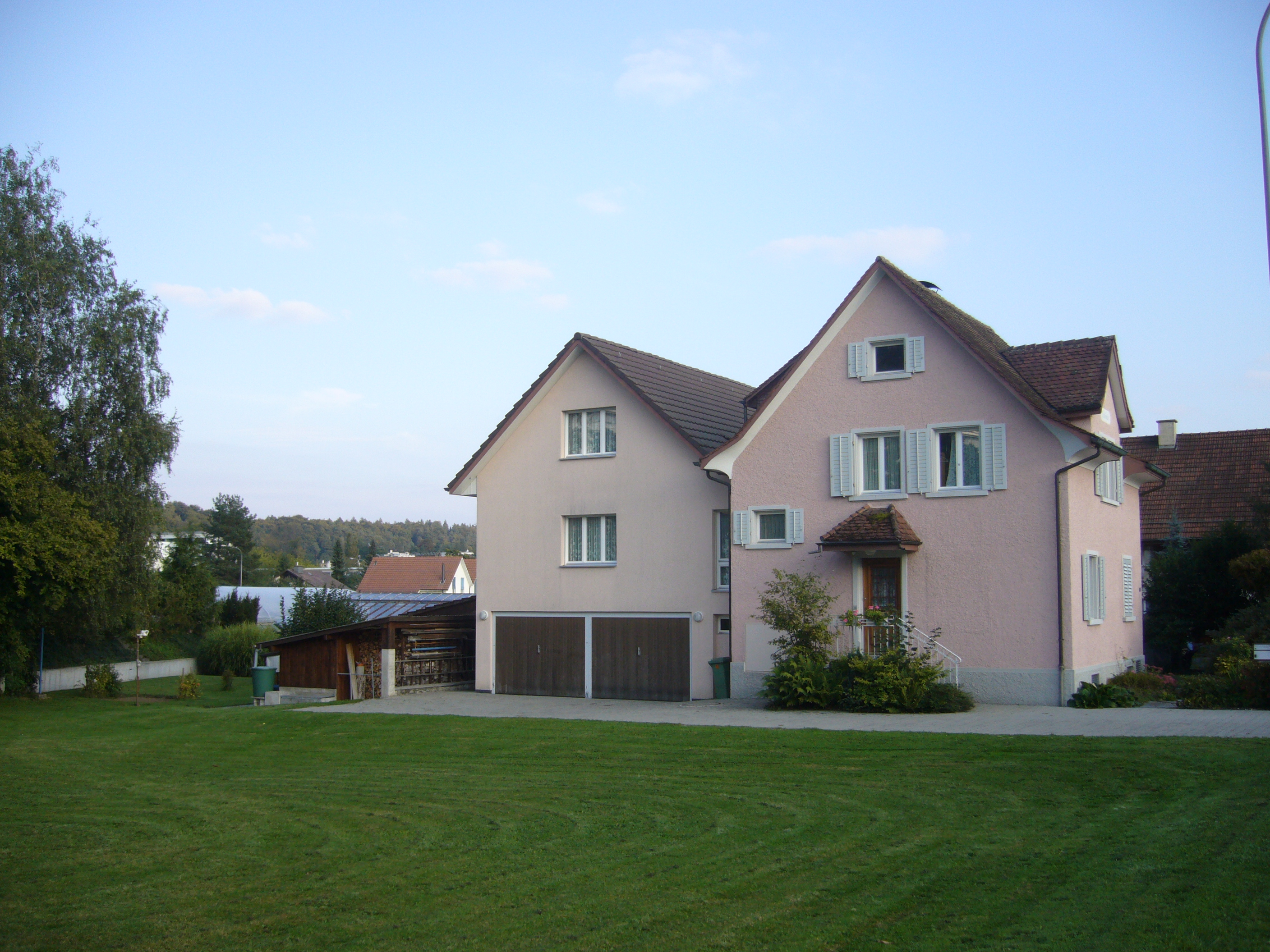 Haus Schönau an der Gerlisbergstraß.